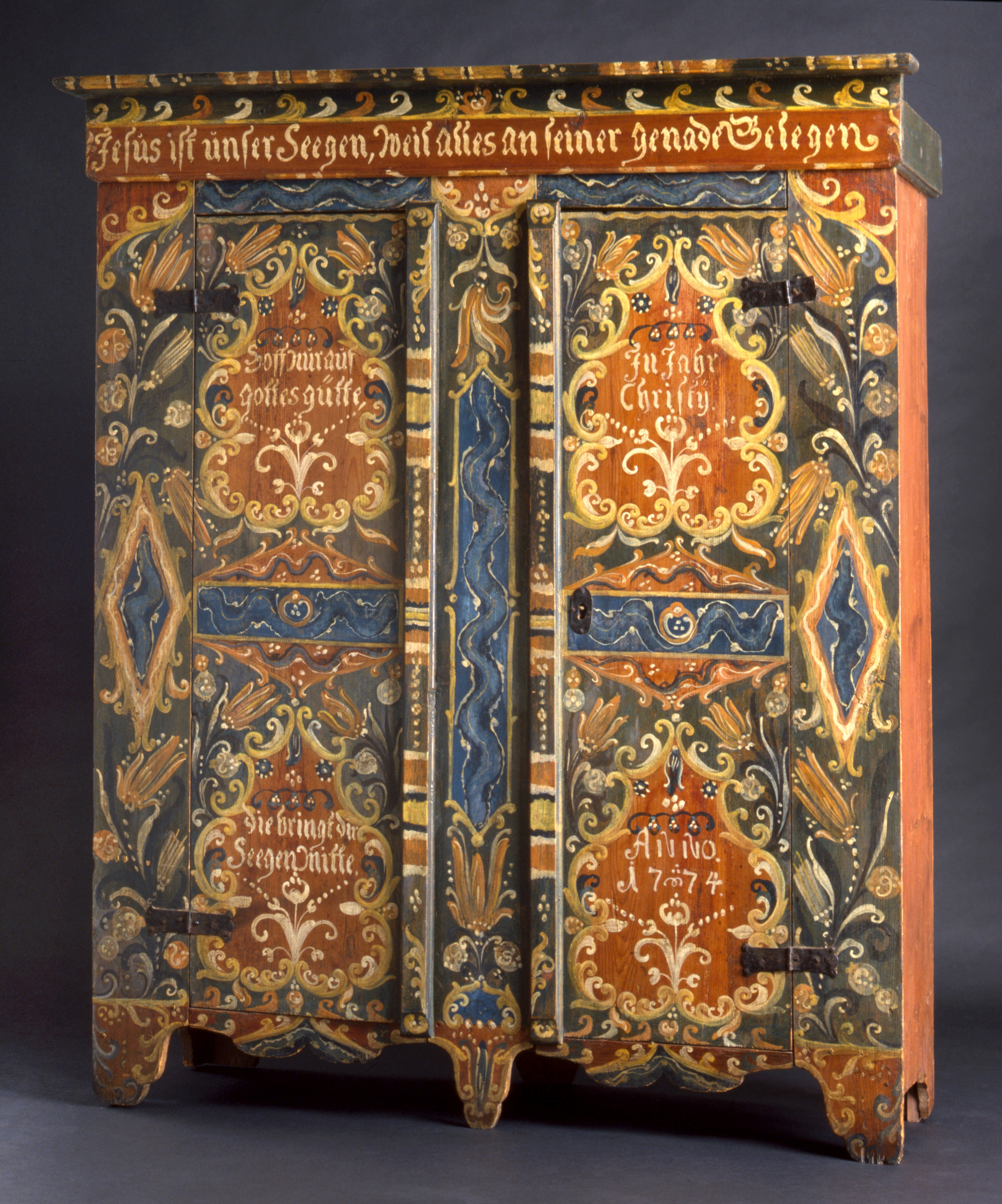 Stollenschrank "Hoff nur auf Gottes Güte. Die bringt dir Segen mitte. In Jahr Christy Anno 1774", 1774, Museum Europäischer Kulturen, Berlin, Inventarnummer: I; 6 G; 11-1955,21. Gebrauchsort: Großhennersdorf bei Herrnhut, Oberlausitz Fichte, bemalt, Höhe x Breite x Tiefe: 180 x 151 x 56 cm GLAM-on-Tour: Wiki goes MEK! 2.0 Wikipedianer fotografierten vom 16. bis 18. November 2018 im Museum Europäischer Kulturen. This photo was taken during a project supported by WMDE. Gefördert von / Supported by: Wikimedia Deutschland, Museum Europäischer Kulturen